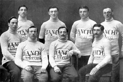 Equip Bianchi guanyador de la classificació per equips al Giro d'Itàlia de 1911